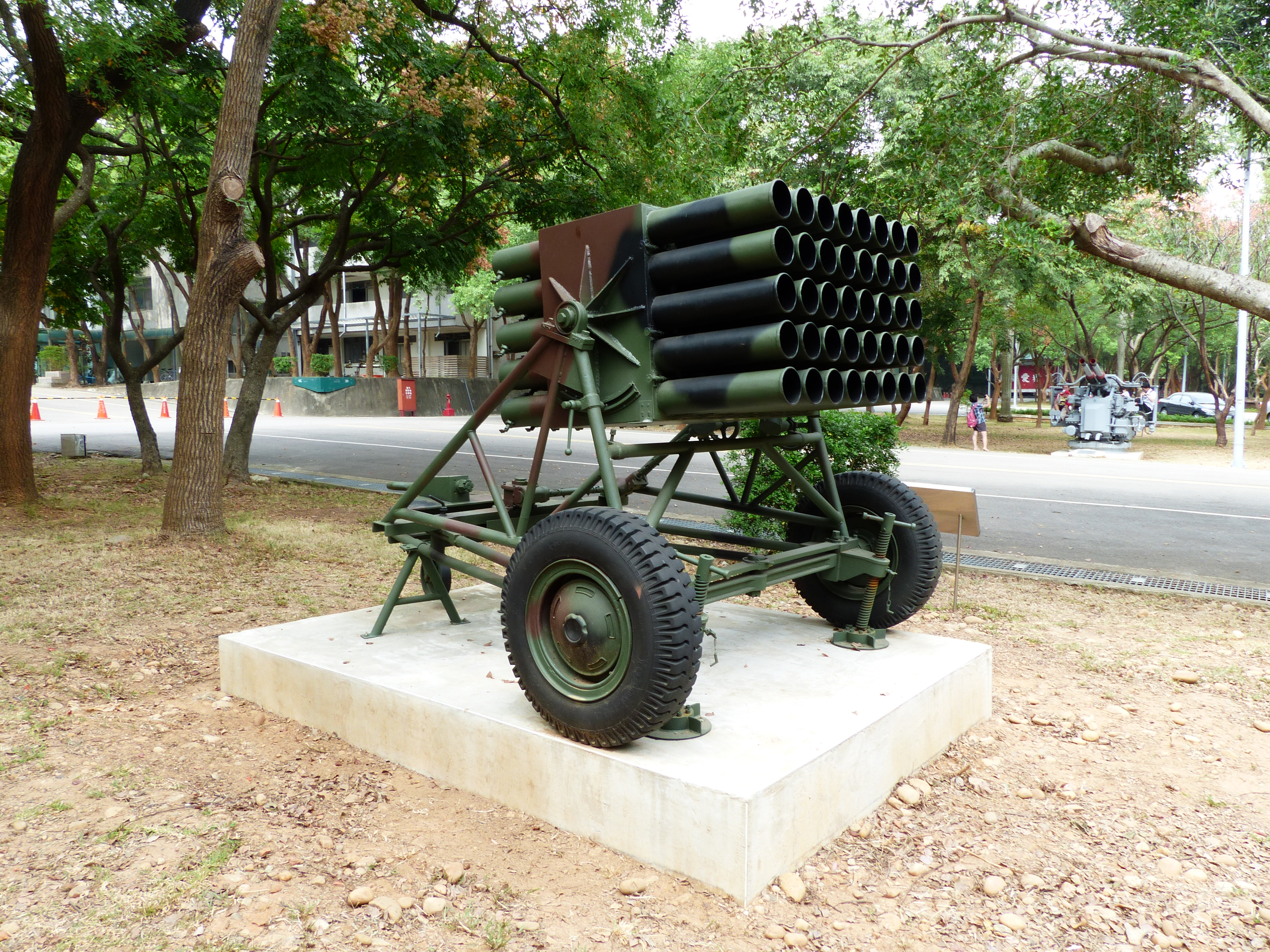 成功嶺靜態保存的牽引式工蜂四型多管火箭發射系統。